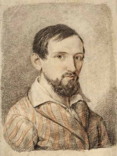 В.Ваньковіч. Аўтапартрэт